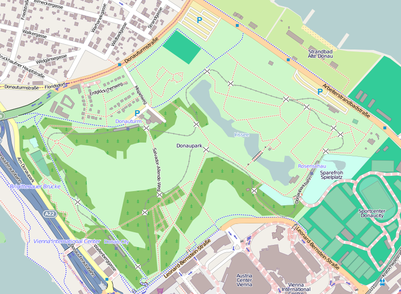 Karte des Donauparks, Auflösung 1:9000